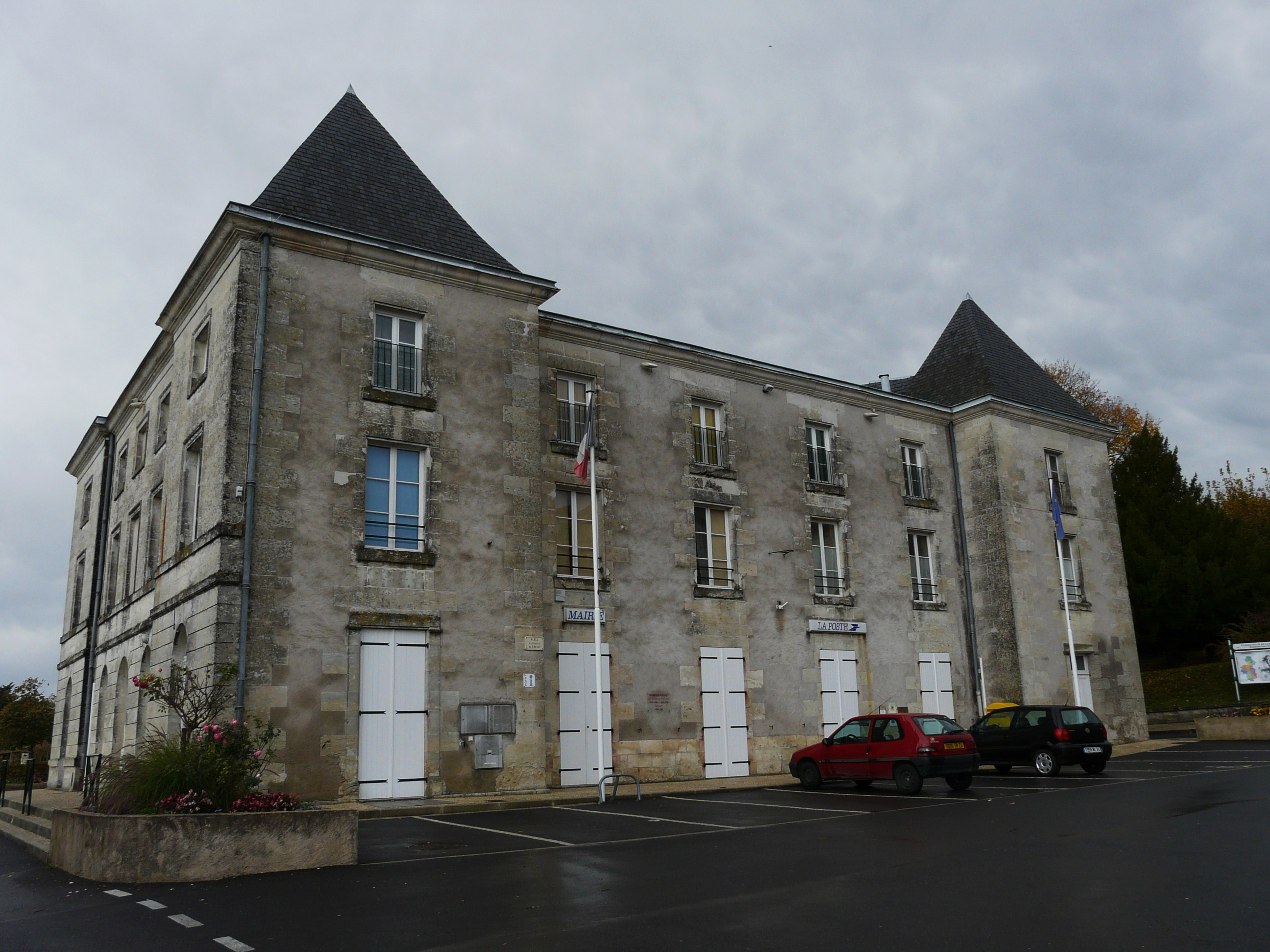 La façade sud-est de la mairie de Mensignac (château de Mensignac), Dordogne, France